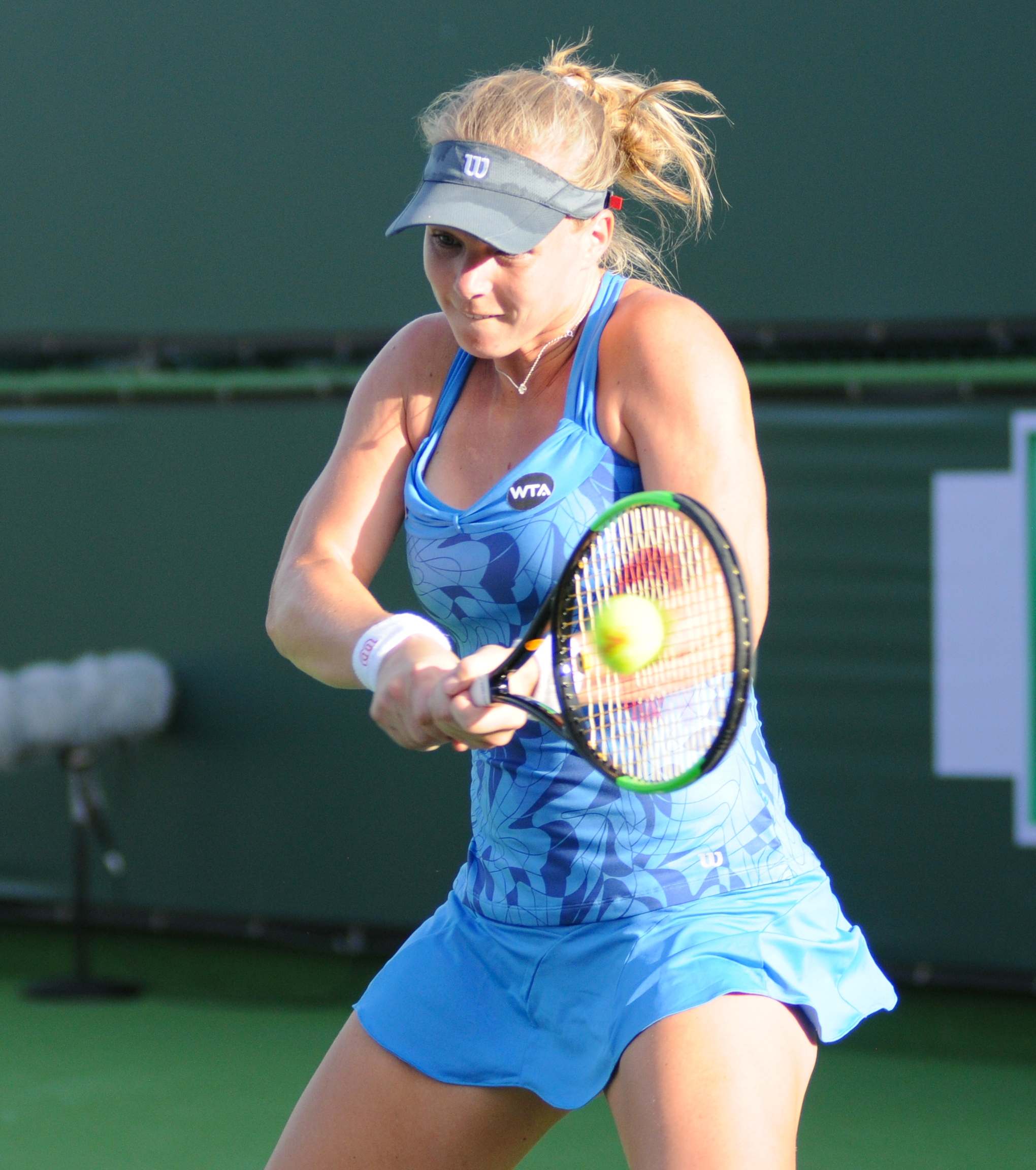 2017 BNP Paribas Open